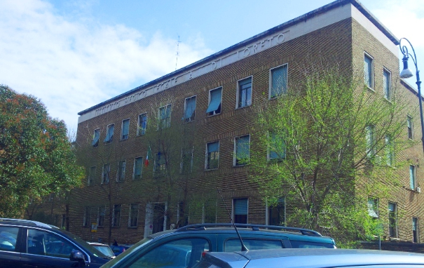 Facciata dell'Istituto-Medico Legale dell'Aeronautica Militare "Aldo di Loreto", Viale Piero Gobetti, Roma.